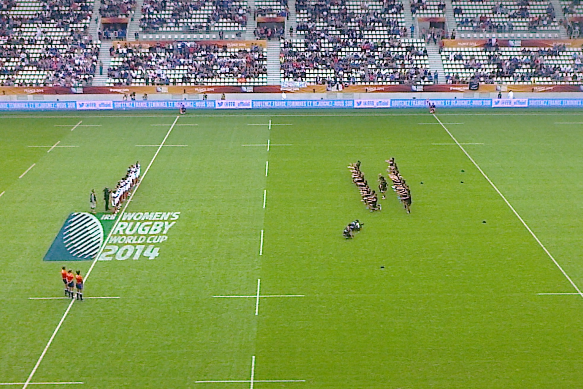 Haka exécuté par les joueuses de l'équipe de Nouvelle-Zélande de rugby lors de la Coupe du Monde 2014 (match pour la 5ème place au stade Jean-Bouin).